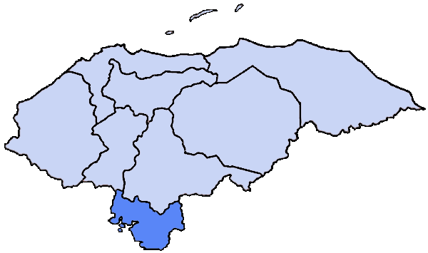 Mappa della diocesi cattolica di Choluteca, in Honduras.